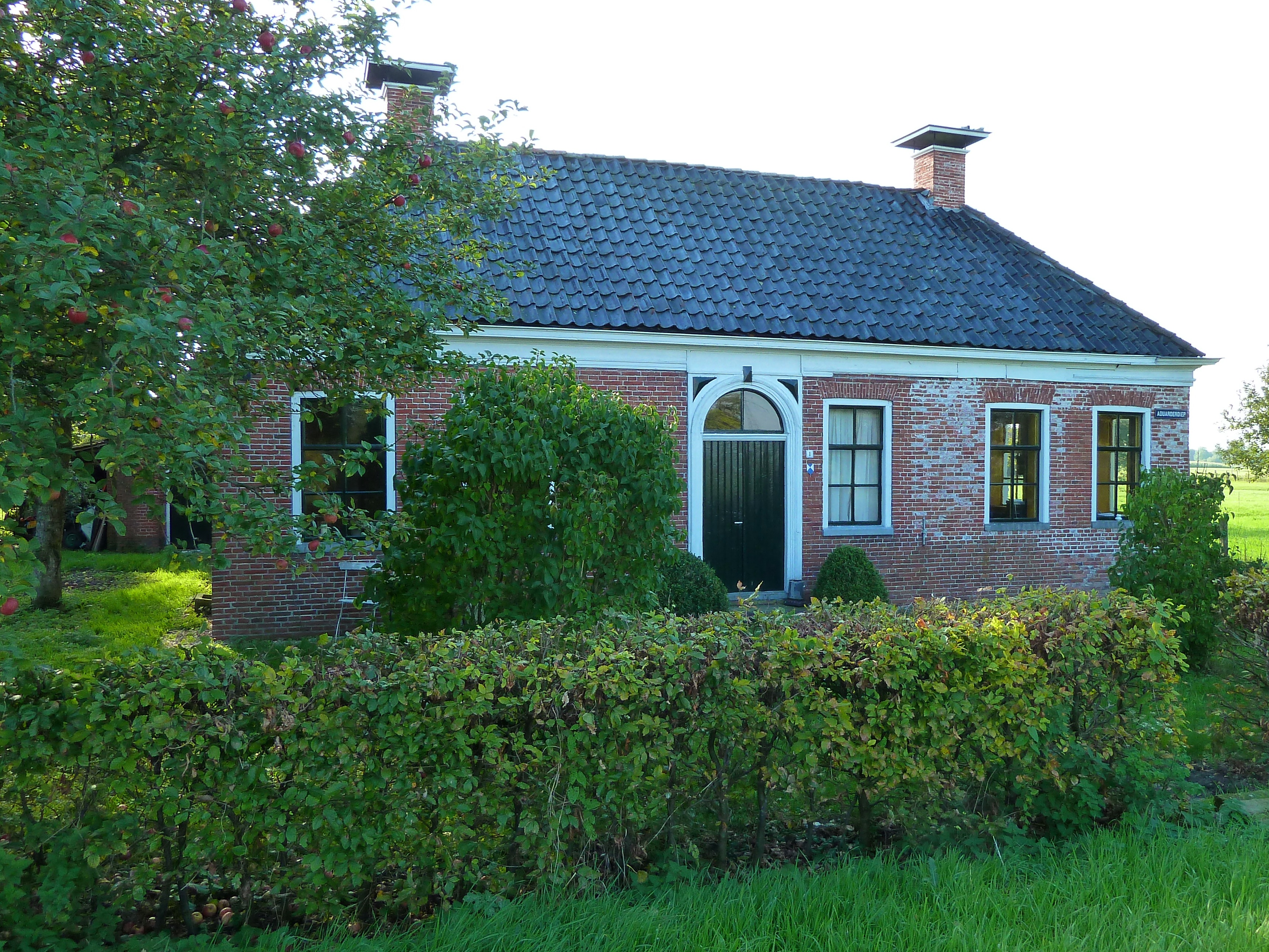 Landelijk pand in het gehucht Schifpot (Groningen, Nederland).